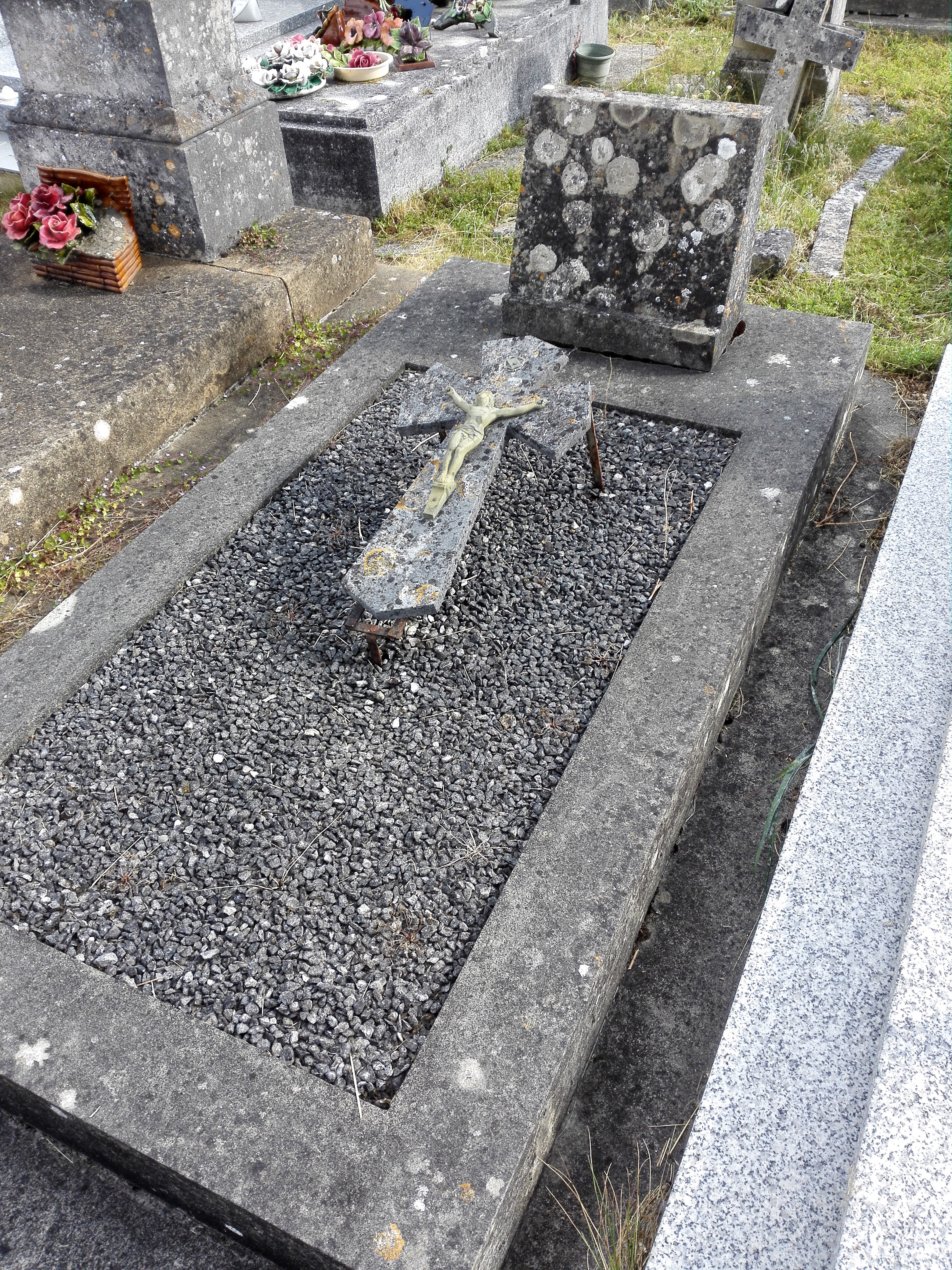 La tombe de Fernand Gonder dans le cimetière de Tonnay-Charente en juin 2020.